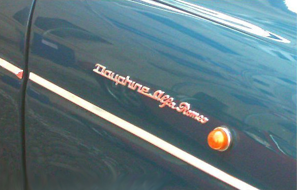 Renault Dauphine Alfa Romeo del 1964, fotografata al Raduno Auto Storiche di Medole nel 2010